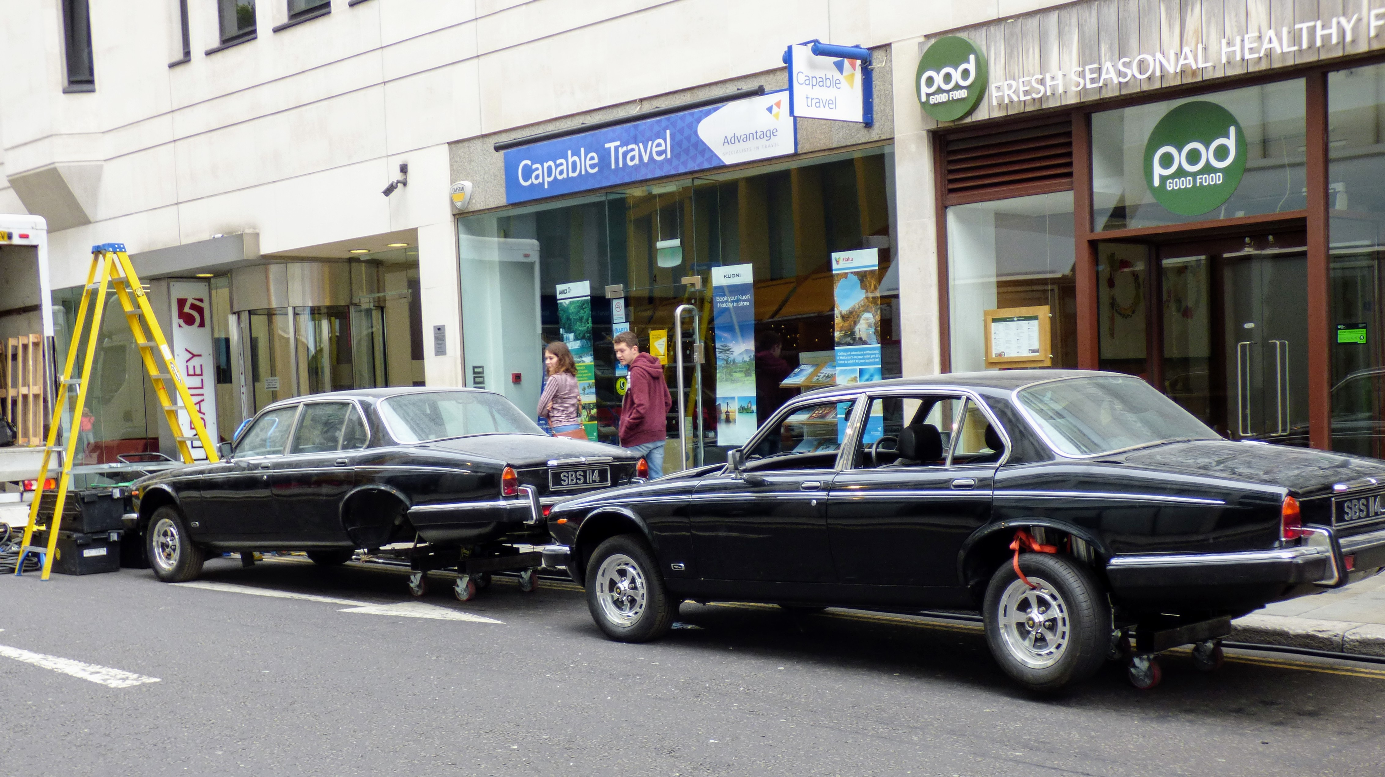 Dreharbeiten für Men in Black International, London 2018 nahe der Saint Paul's Cathedral